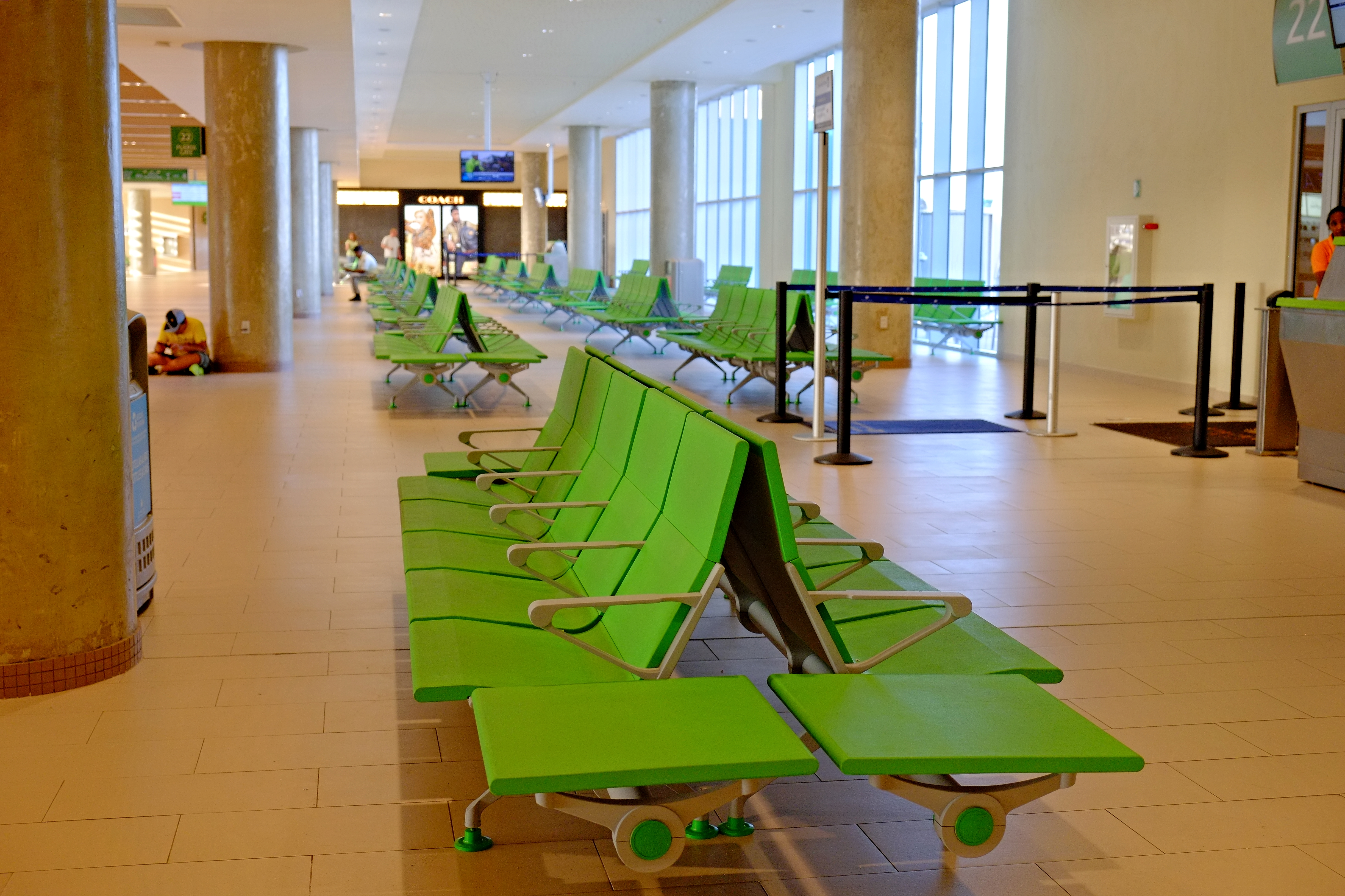 Punta Cana, Dominican Republic